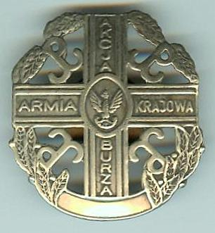 Odznaka AK przyznawana za udział w "Akcji Burza"